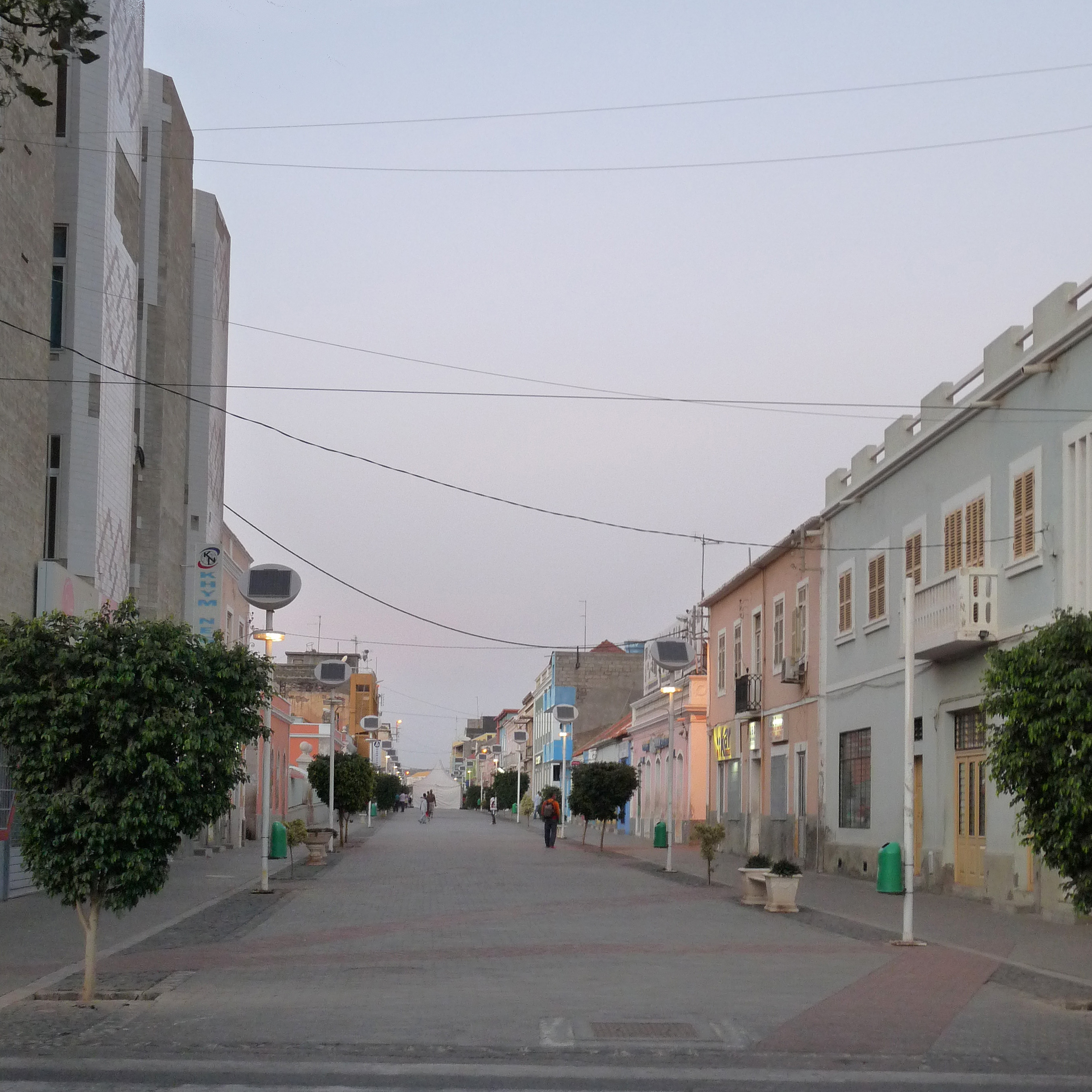 Praia (Cap-Vert) : rue